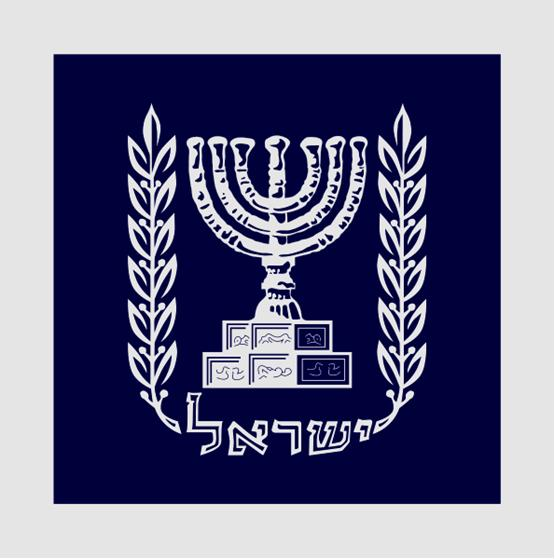 דגלו האישי של נשיא מדינת ישראל